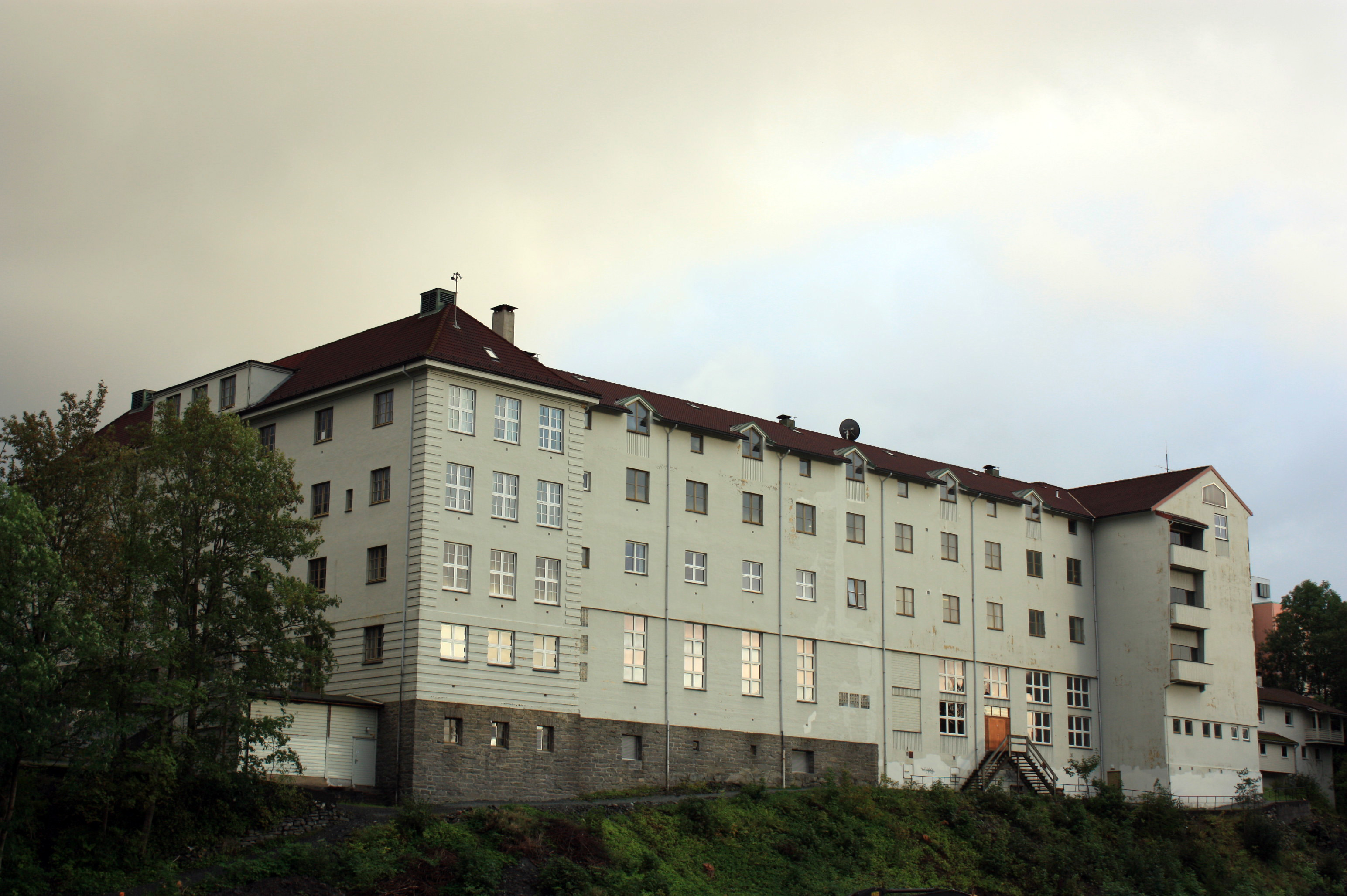 Fana gymnas, Fana, Bergen.